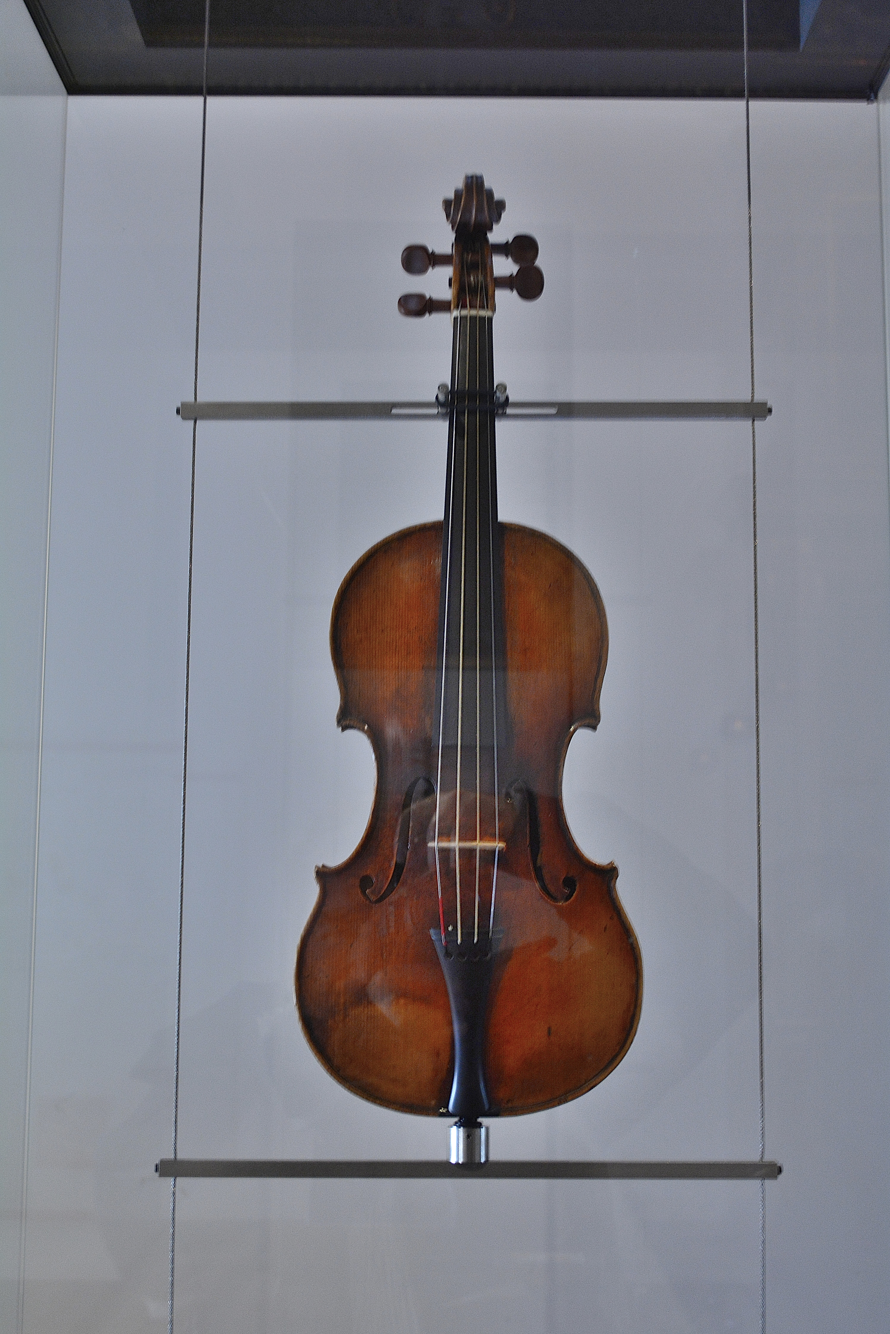 Palazzo Doria-Tursi - Musei di Strada Nuova This is a photo of a monument which is part of cultural heritage of Italy.